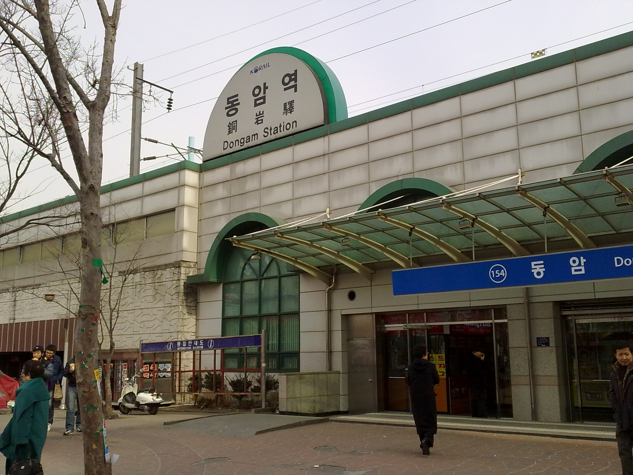 동암역